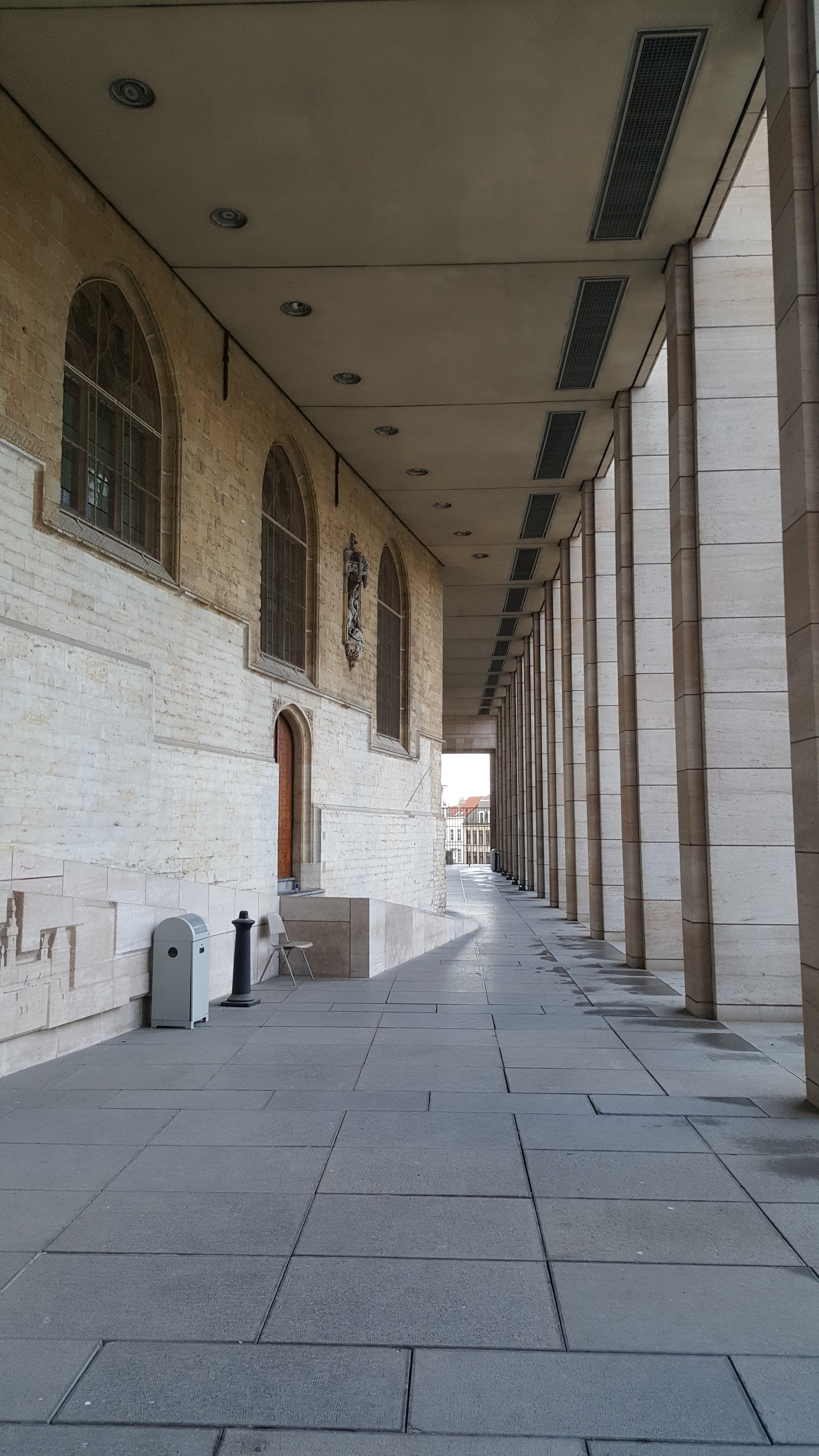 M.H_Albertine